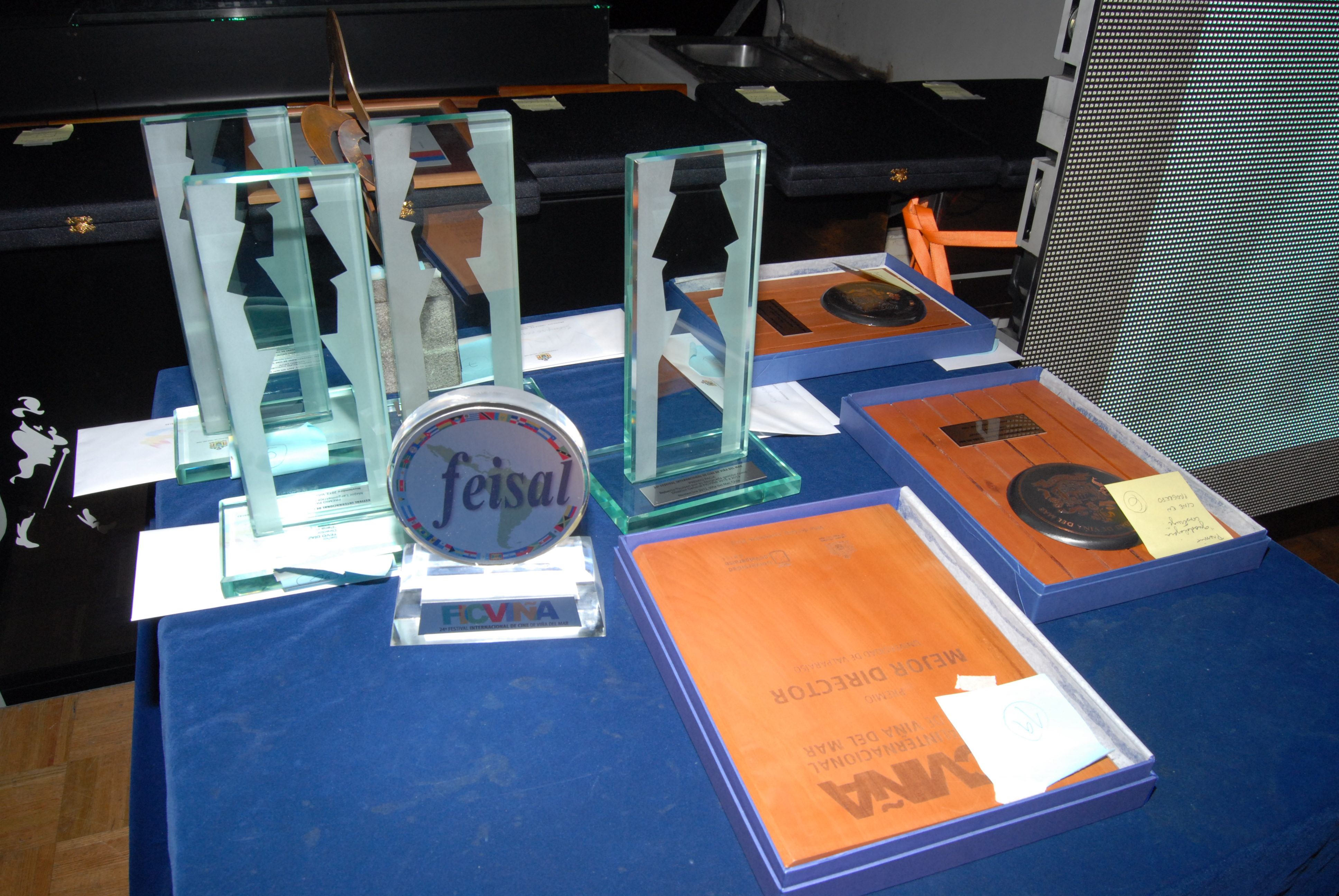 Premiación 24 FICVIÑA